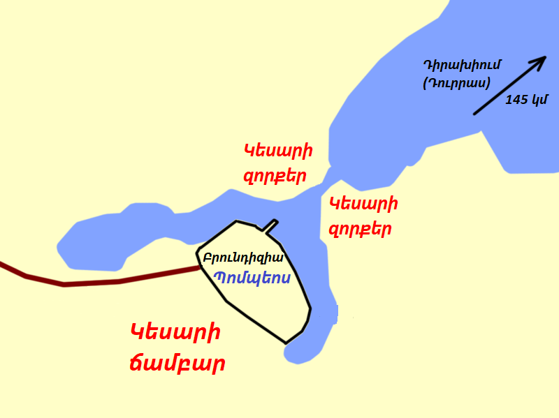 Բրունդիզիայի պաշարումը Կեսարի կողմից, երբ Պոմպեոսը իր զորքերով լքեց բուն Իտալիան և մեկնեց Դիրախիում։